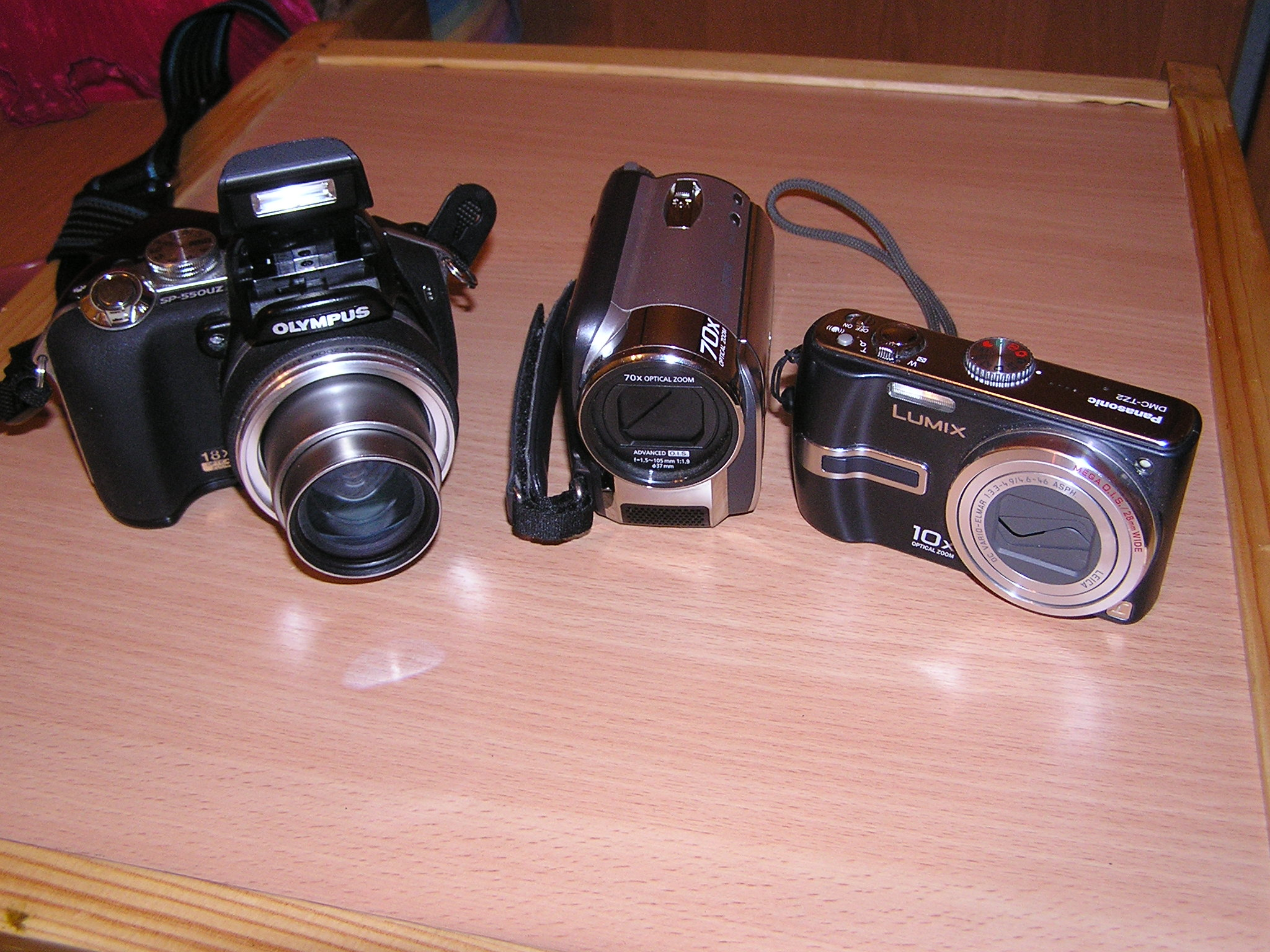 Фотоаппарат.